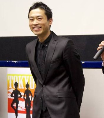 2015年上映会にて